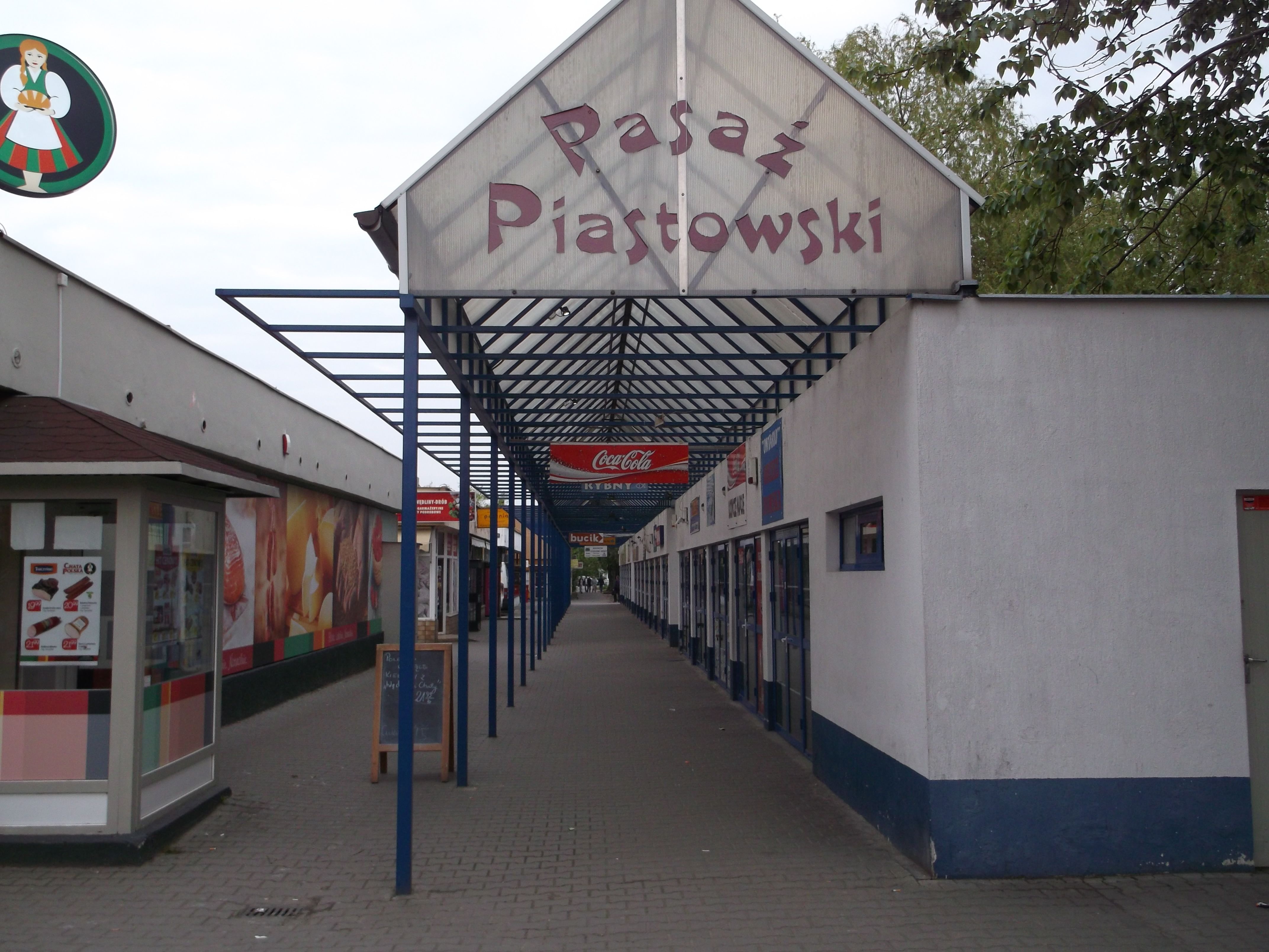 Osiedle Piastowskie w Poznaniu.